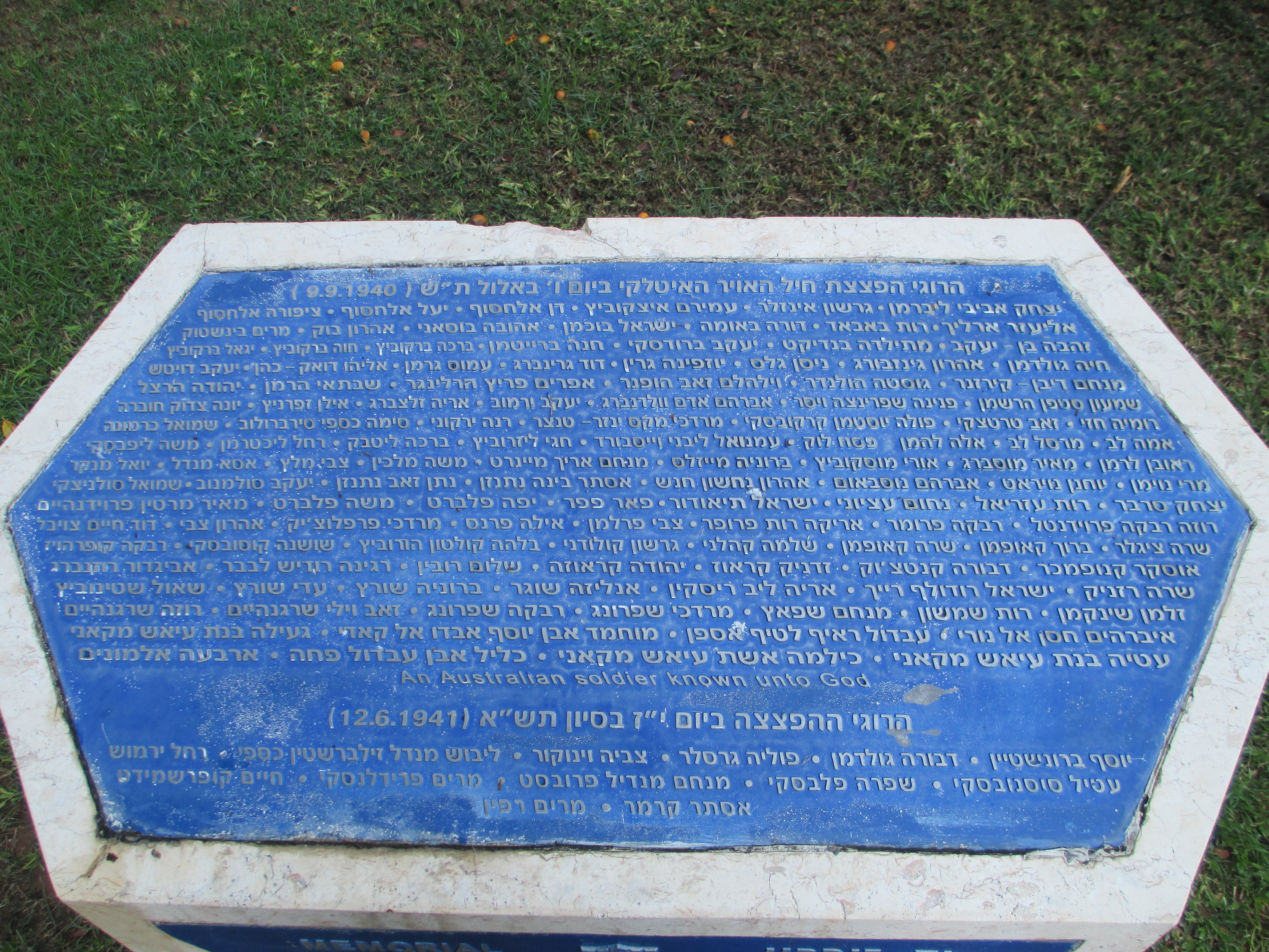 אנדרטה לנספים בהפצצות על תל אביב במלחמת העולם השנייה